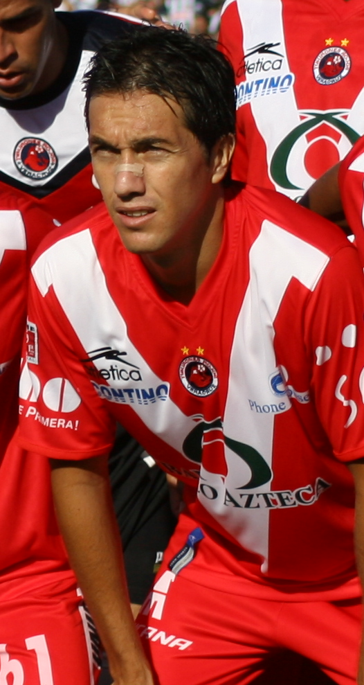 Antes de que les clavaran siete, tan optimistas que se veían.